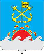 Герб Охотского района Хабаровского края